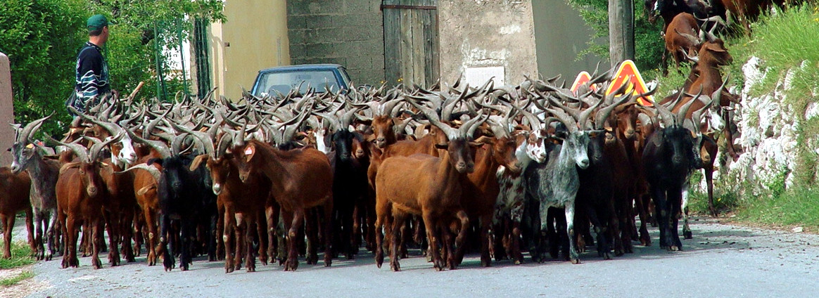 Troupeau de chèvres du Rove, village du Rove (Bouches du Rhône, France)